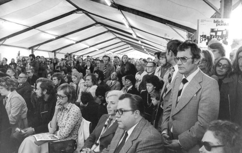 ADN-ZB 14.10.1974 BRD Düsseldorf-Pressefest der "UZ" Von 21. bis 22.10.1974 fand in Düsseldorf das erste zentrale Pressefest der DKP-Zeitung "Unsere Zeit" statt. Über 250 000 Menschen besuchten die vielfältigen politischen und kulturellen Veranstaltungen auf den Rheinwiesen. Auf einem Forum mit internationalen Gästen im überfullten "UZ"-Zelt konnte George Polikeit, Chefredakteur der "UZ", feststellen, daß das Fest alle Erwartungen übertroffen habe. Es sei ein großes Volksfest der arbeitenden Menschen und ein kulturelles Ereignis von Rang gewessen. Unter den Gästen befand sich auch der Leiter der Ständigen Vertretung der DDR in der BRD, Botschafter Dr. Michael Kohl (1. Reihe sitzend 1.v.r.).